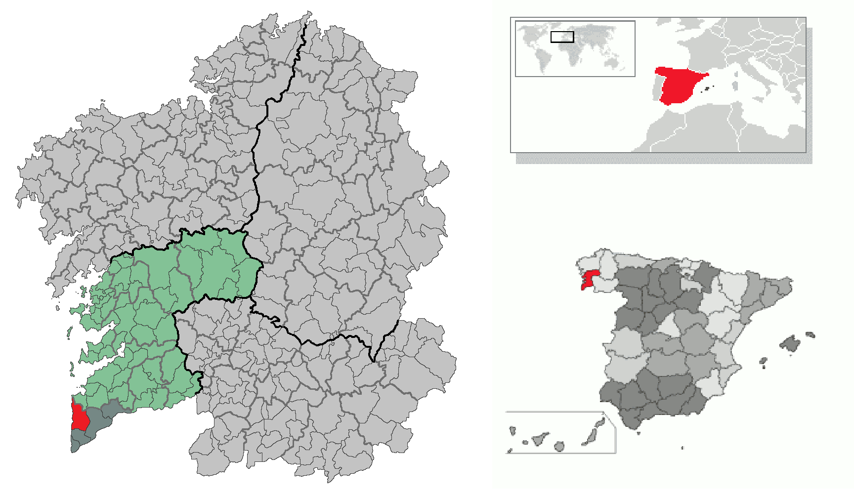 Municipio de Oia respecto a la provincia de Pontevedra, al país de España y al continente de Europa